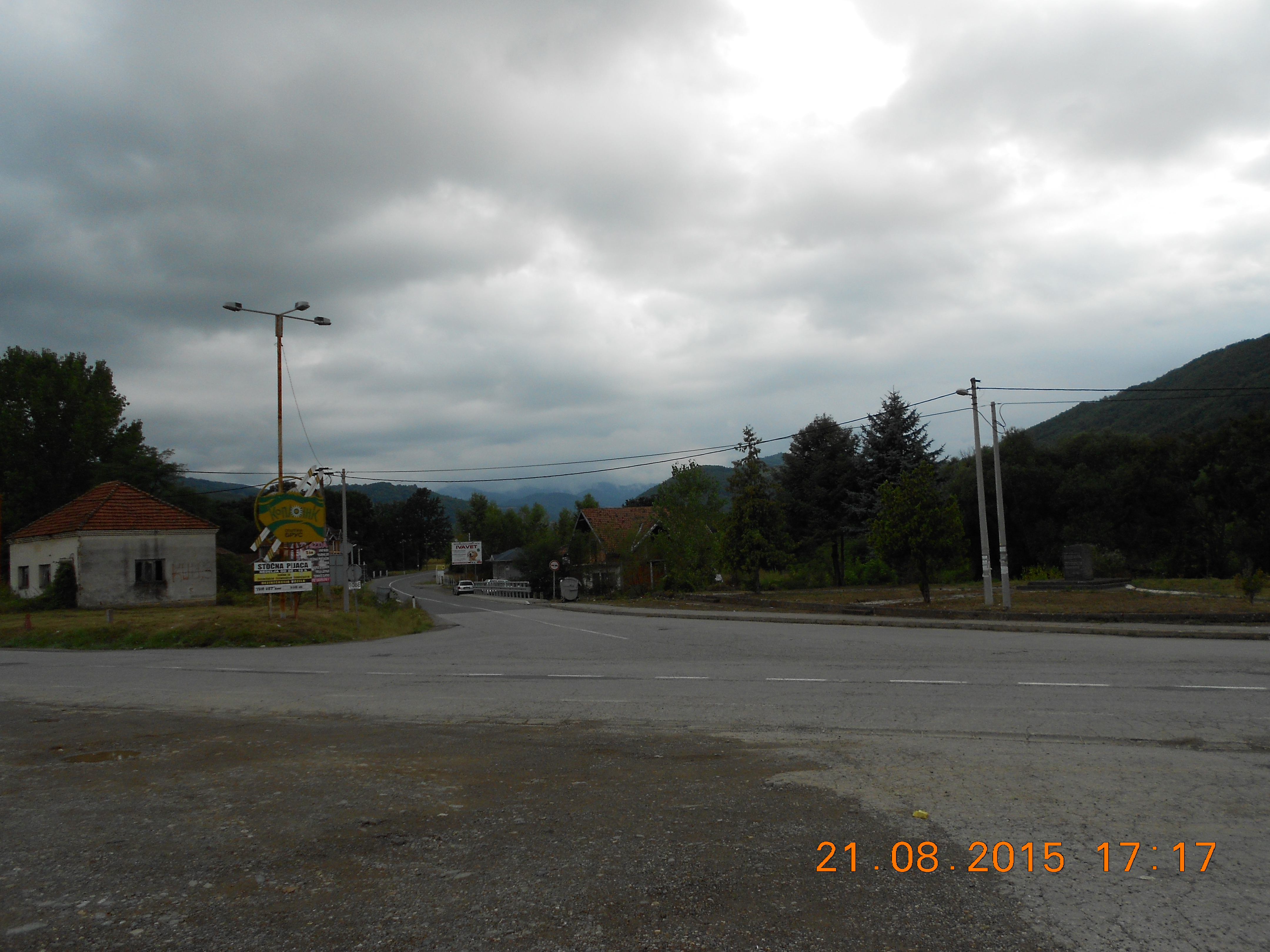 Равни, раскрсница путева за Блаце, Брус и Крушевац